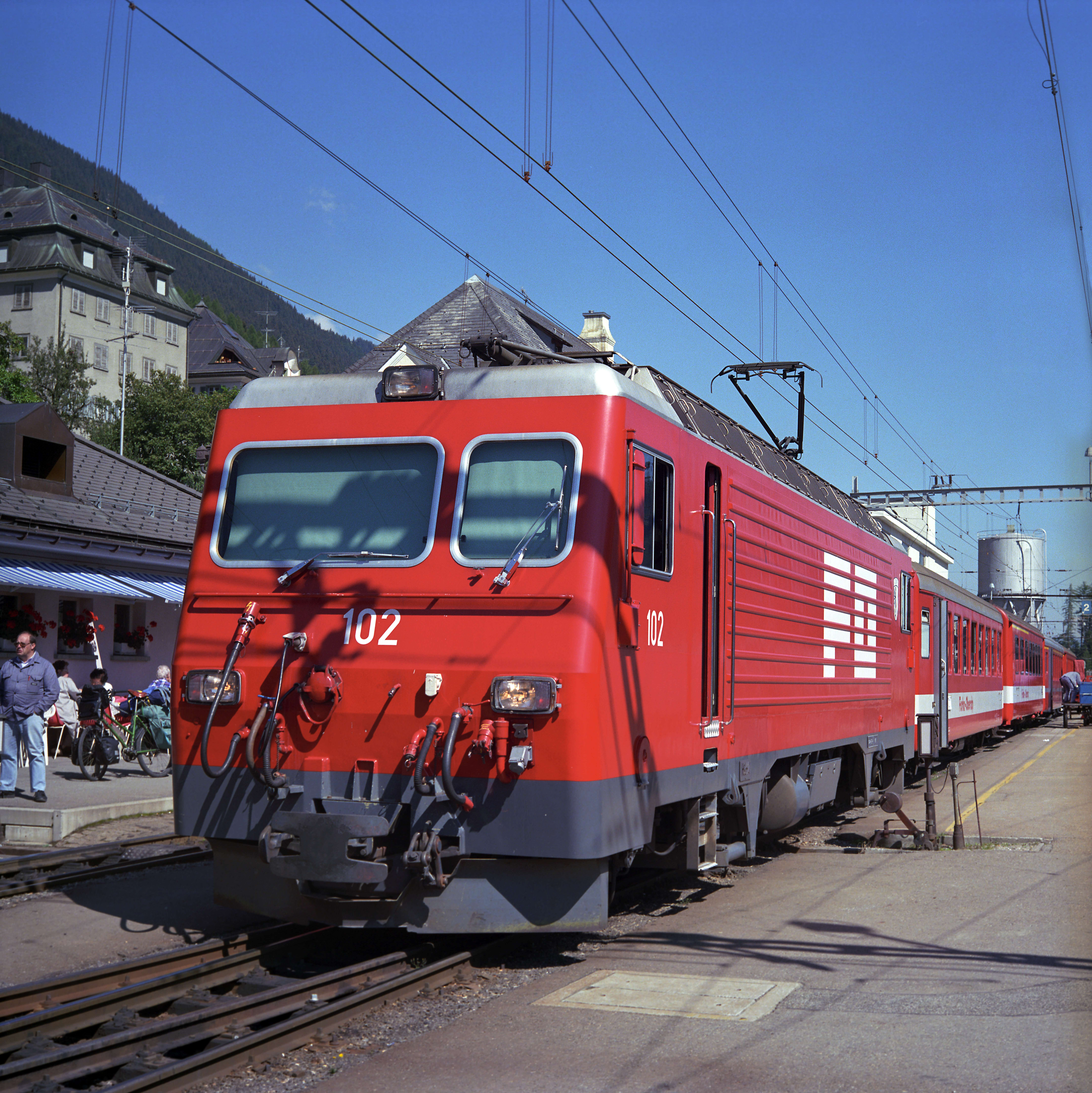 Eine der Prototypmaschinen dieser Bauart beim Bespannen eines durchgehenden Schnellzuges von Chur Richtung Brig.